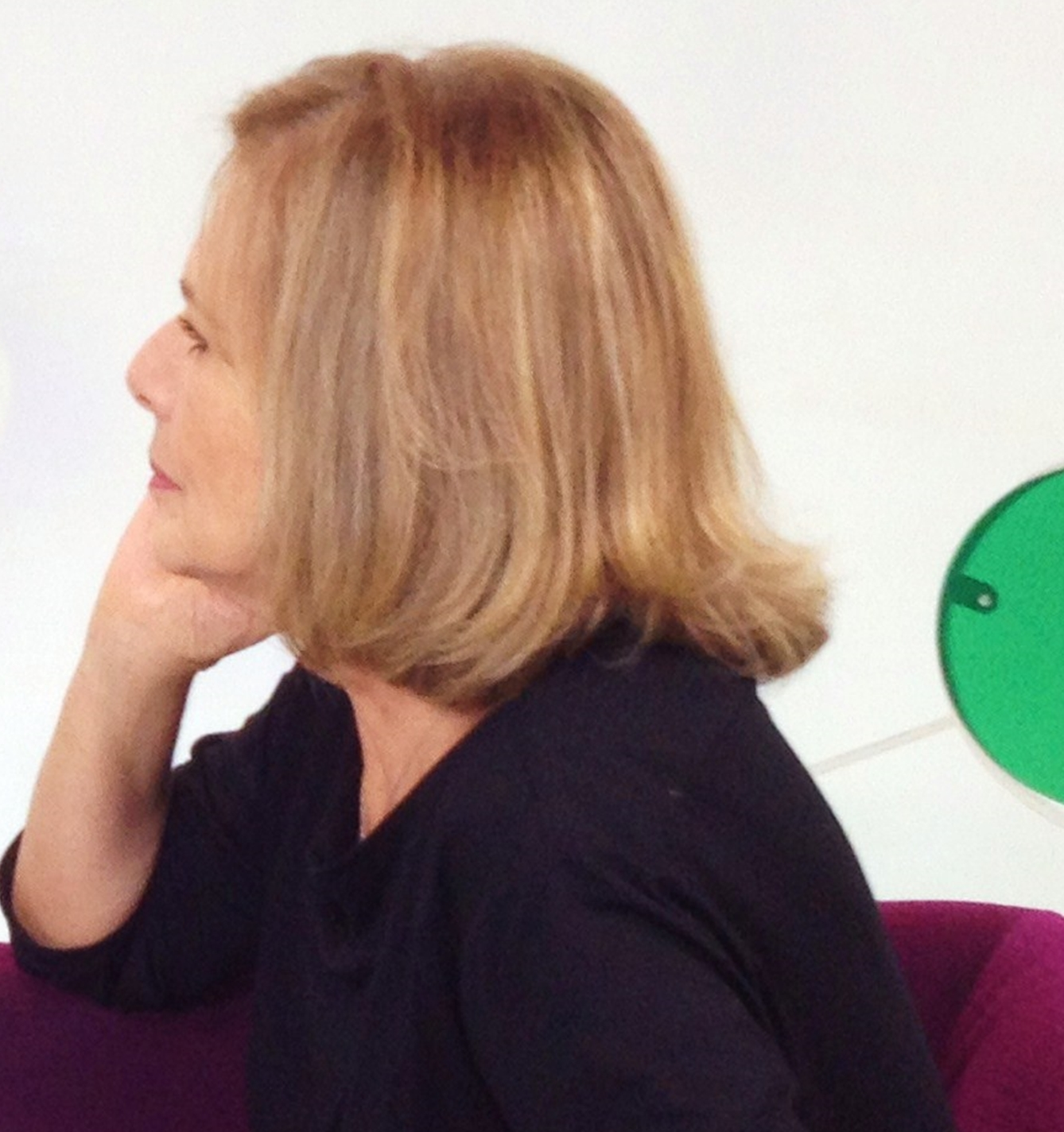 A atriz brasileira Irene Ravache